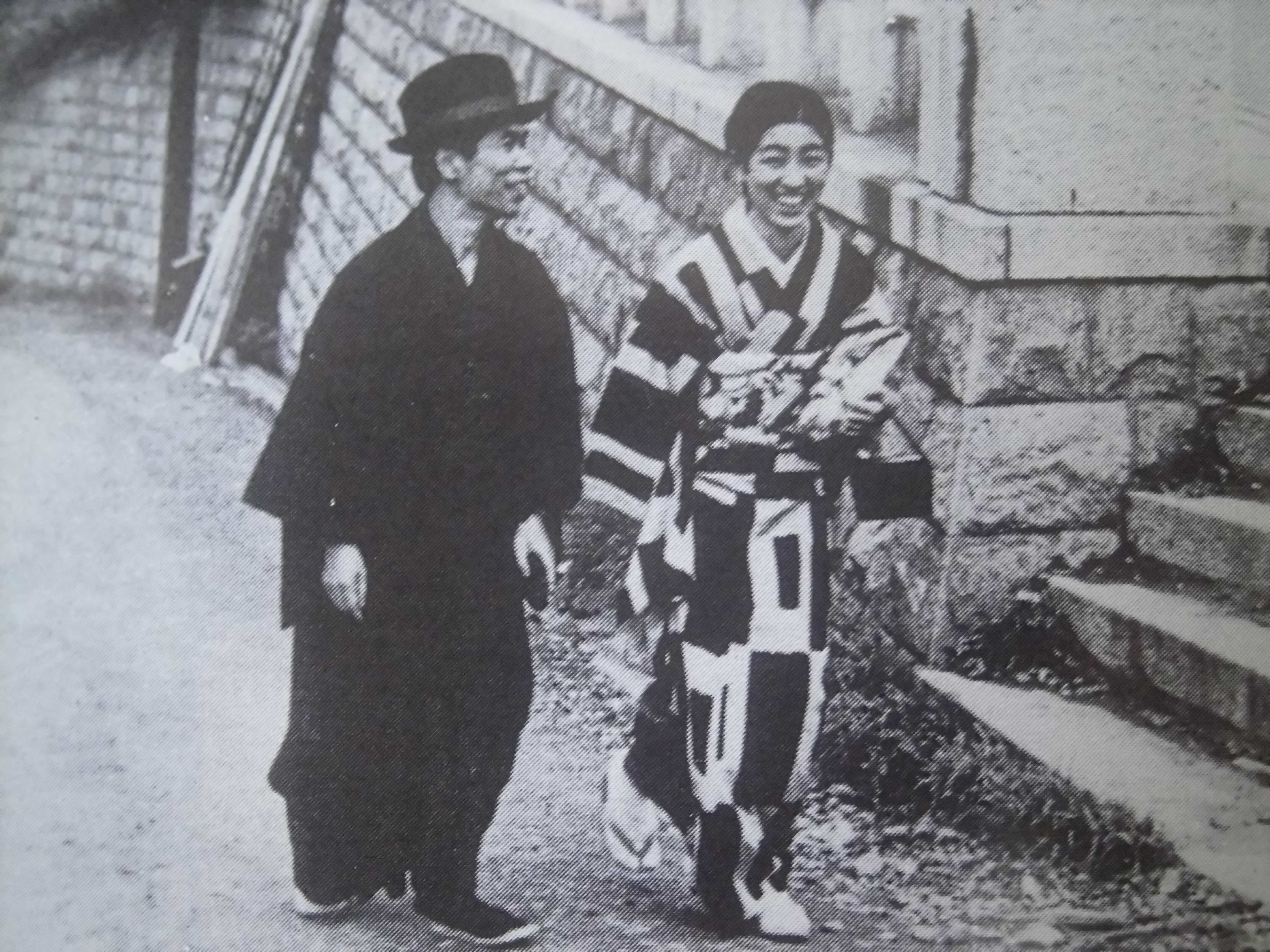 吉川家（Yoshikawa Family1）